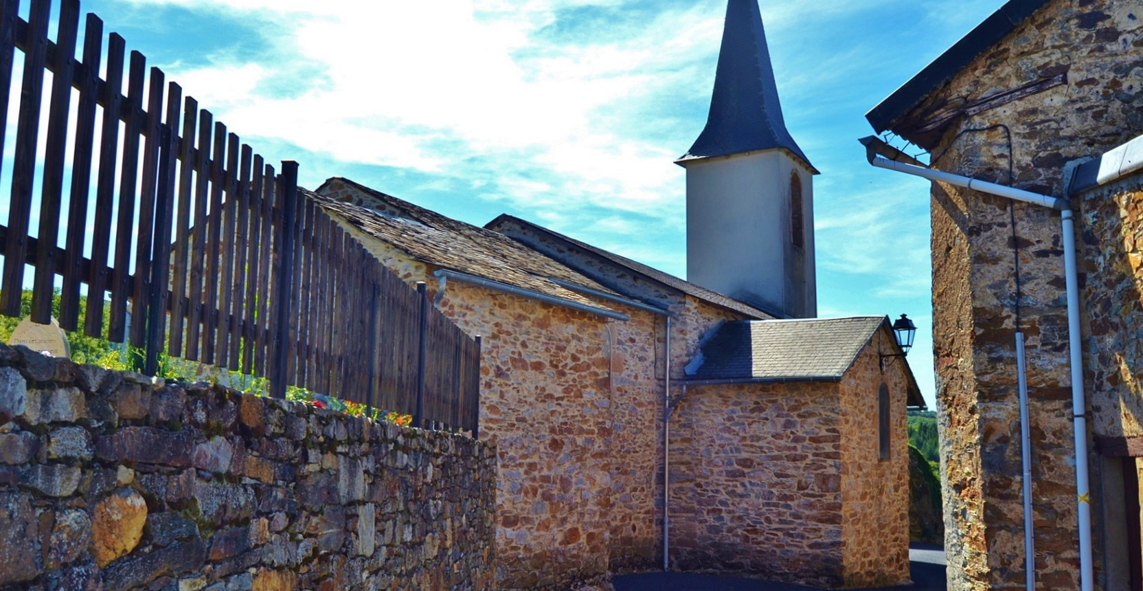 église St Salvy